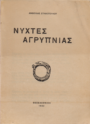 Portada del libro de Anthoula Stathopoulou "Nyxtes agripnias", Tesalónica, 1932